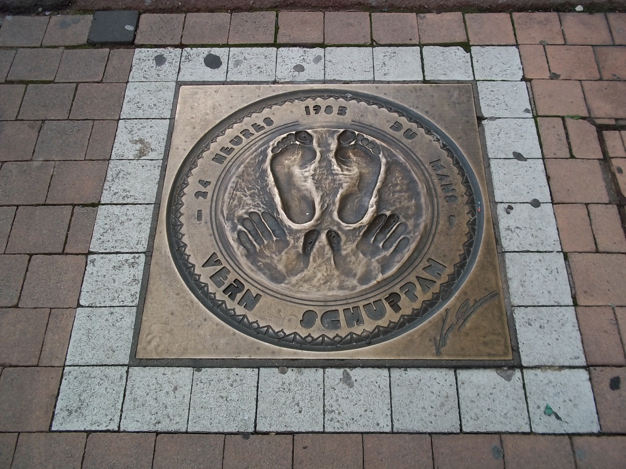 Plaque de bronze des empreintes de Schuppan